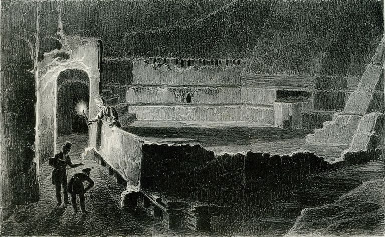 Gravure des thermes romains d'Aix-les-Bains